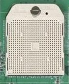 AMD CPU Socket S1